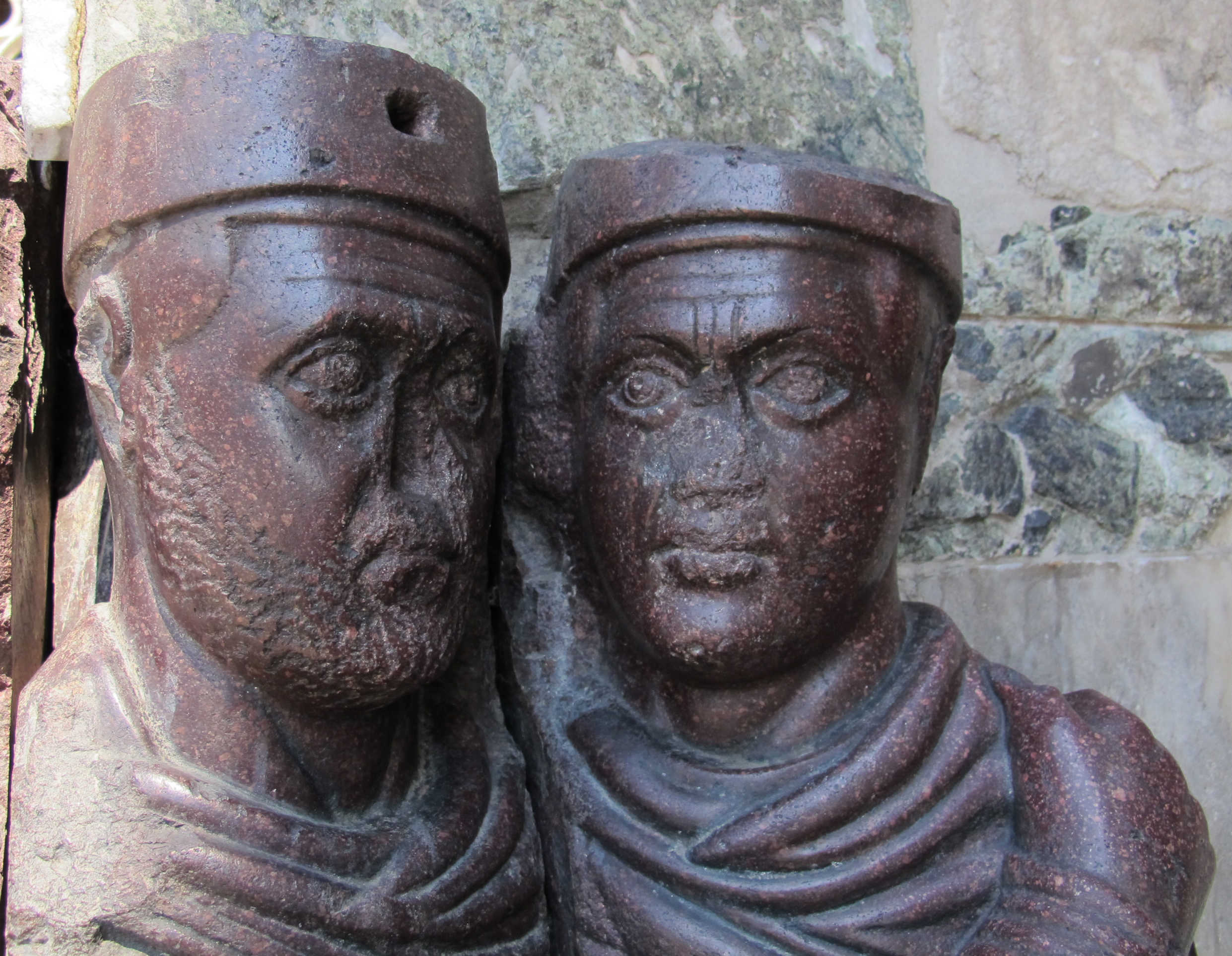 Venezia, tetrarchi